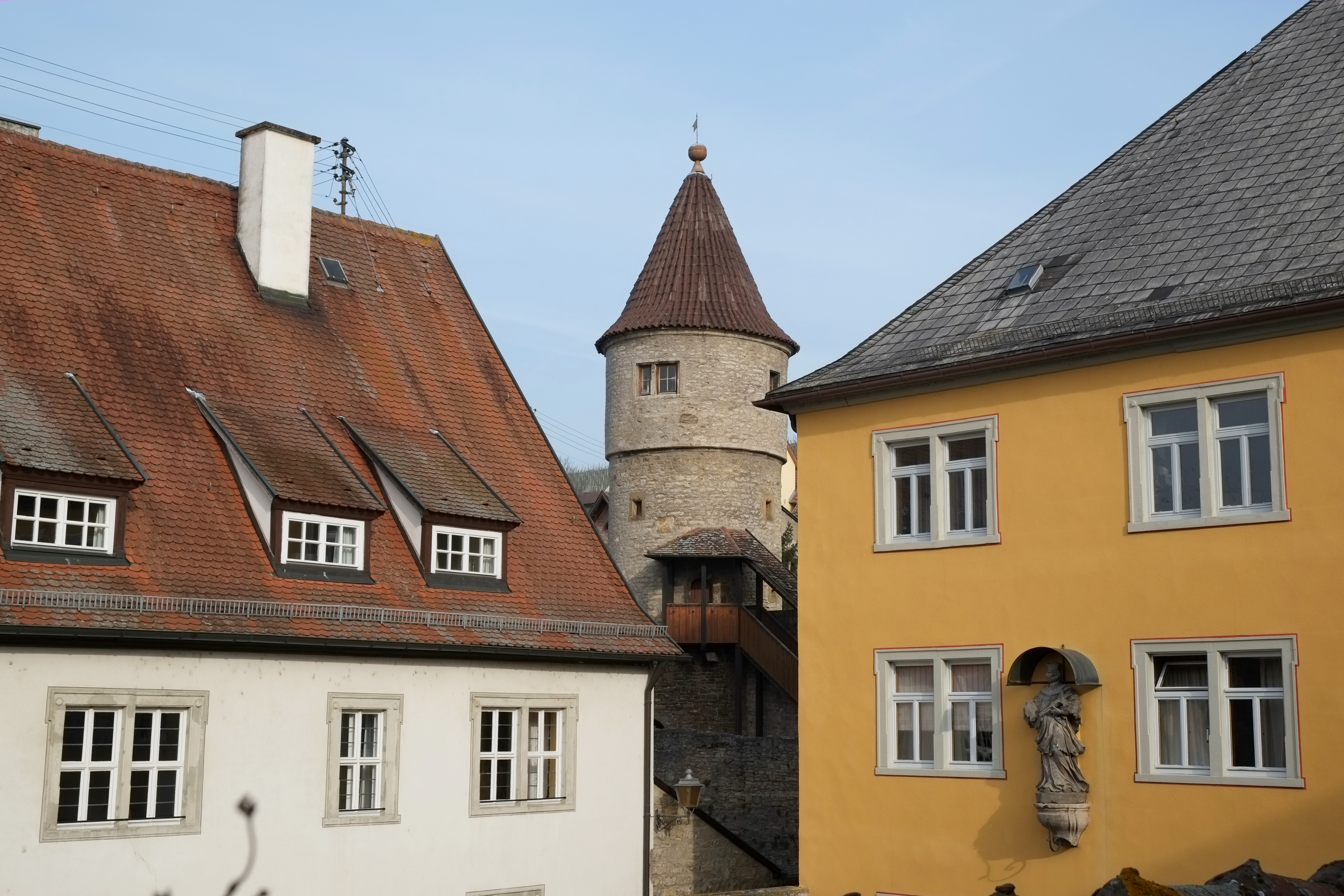 Frickenhausen am Main im Landkreis Würzburg (Bayern, Deutschland)